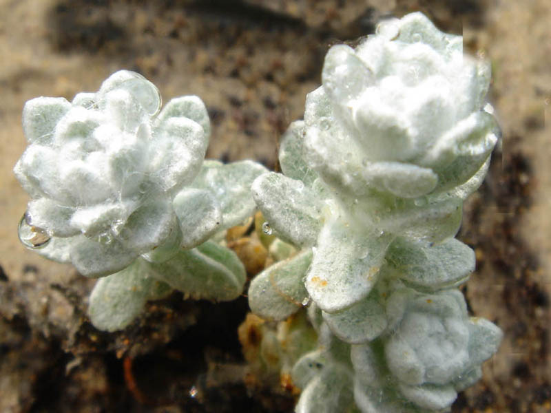 Otanthus maritimus